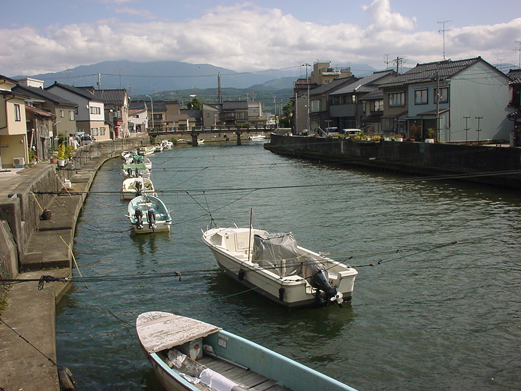 Kado River in Toyama, Japan. ja: 角川（富山県魚津市新角川 上口橋（かみくちはし）より上流方向撮影）